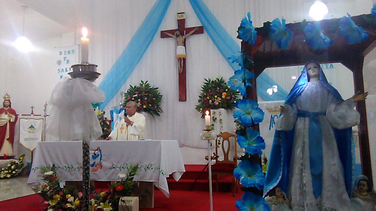 Padre Antonino Arillaga celebrando misa de la fiesta de la Inmaculada Concepción en Huiloapan, Veracruz